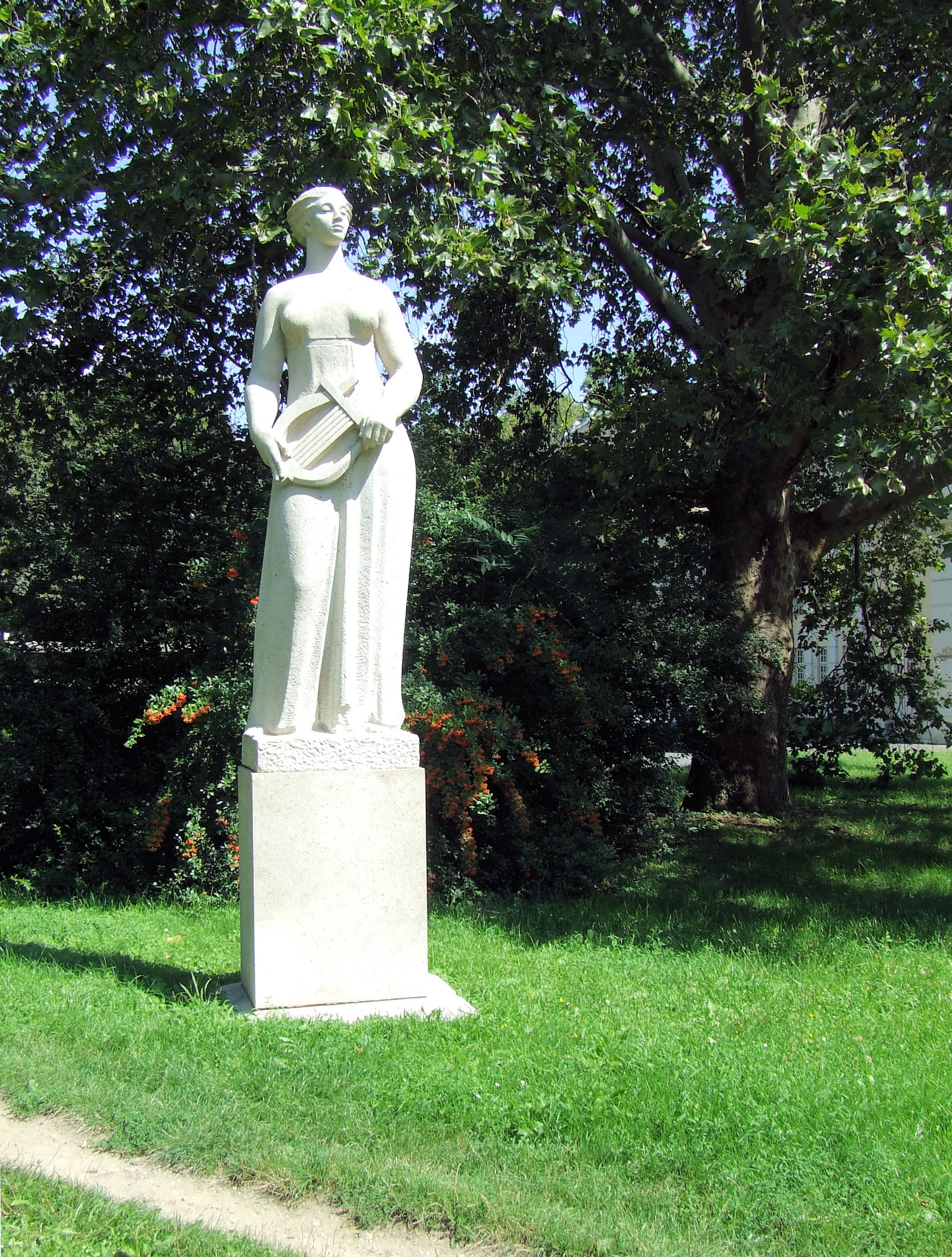 Marton László Nő hárfával című szobra a kaposvári Csiky Gergely Színház előtt (1963)